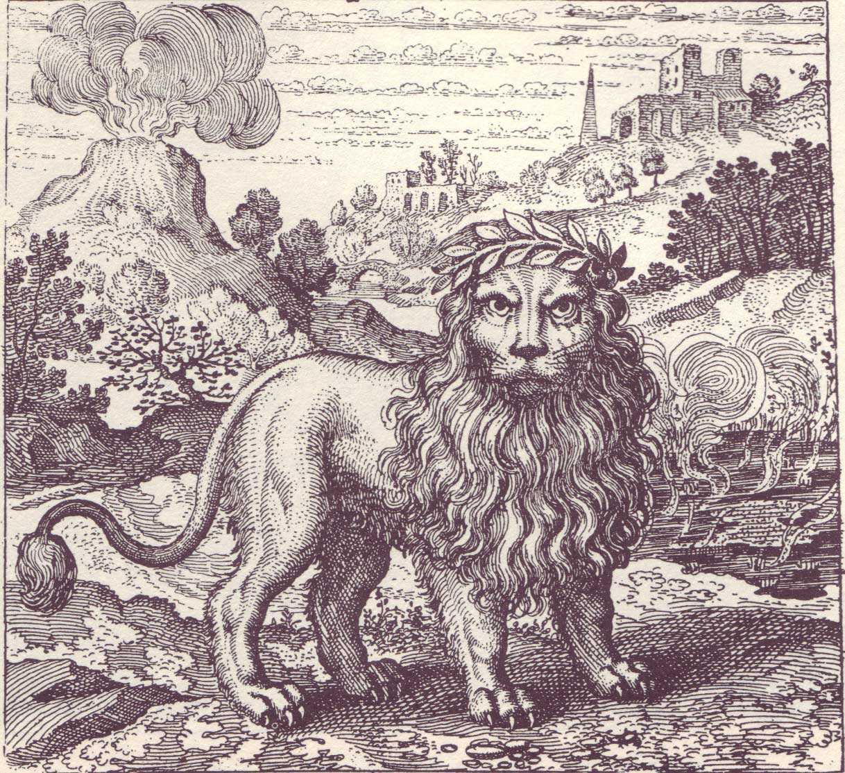 Ein Kupferstich von Matthäus Merian in Michael Maiers Buch Atalanta fugiens